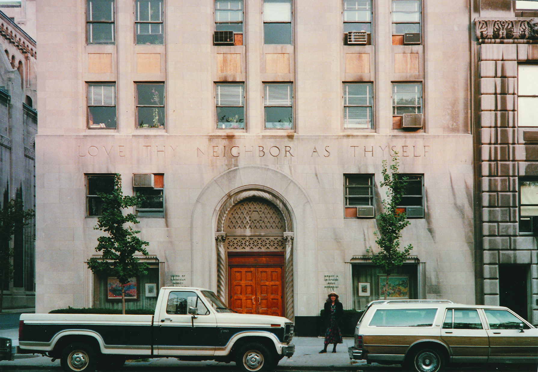 שרה גלבוע בפתח ה-Union of the American Hebrew Congregation בה הציגה בתערוכת יחיד, ניו-יורק 1987